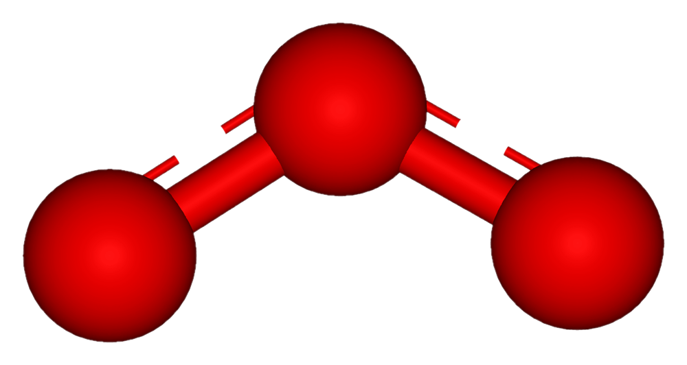 Ozone-3D-ball-stick